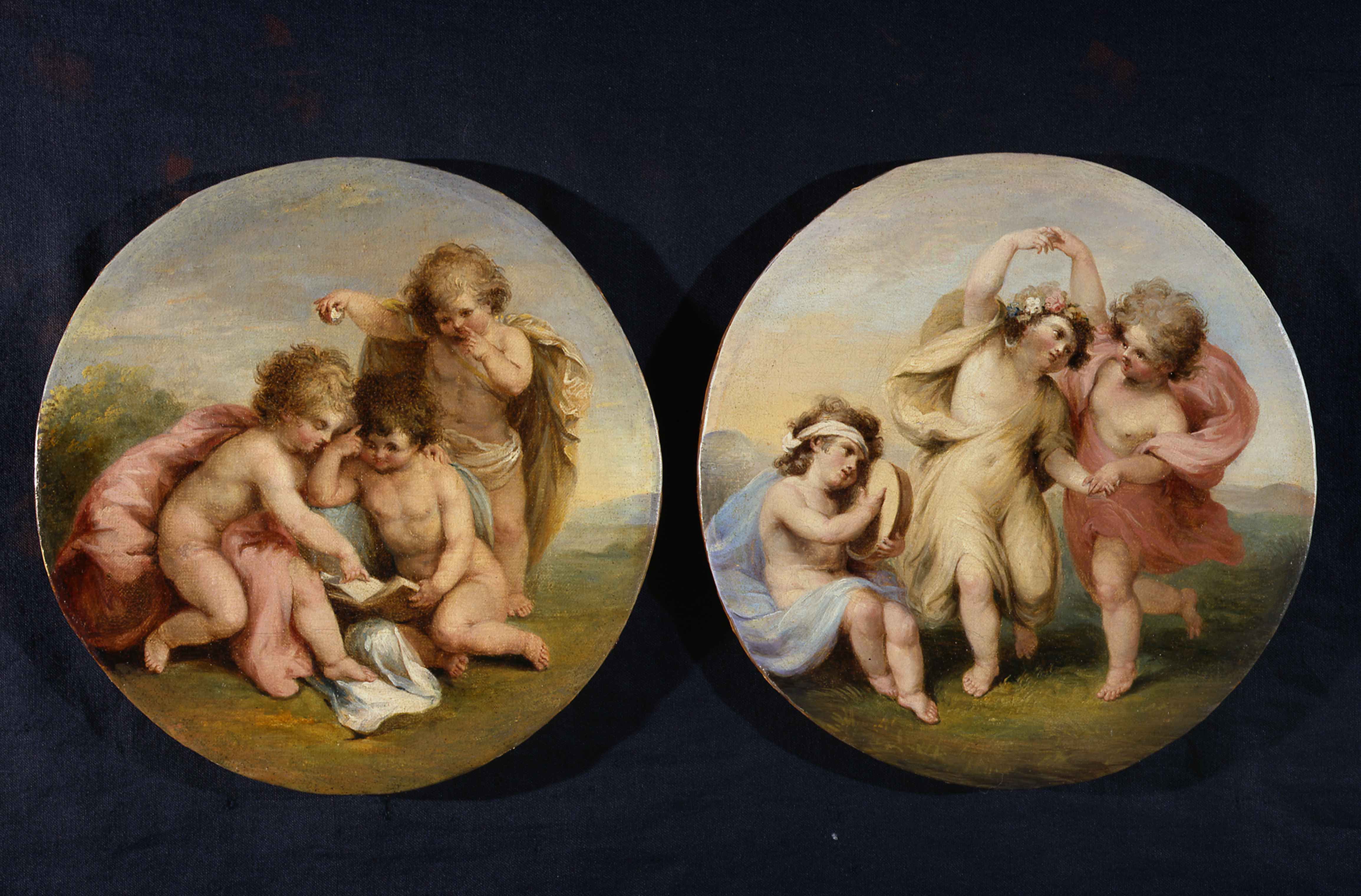 Coppia di tondi con pupetti, Collezione Mainetti (Roma)